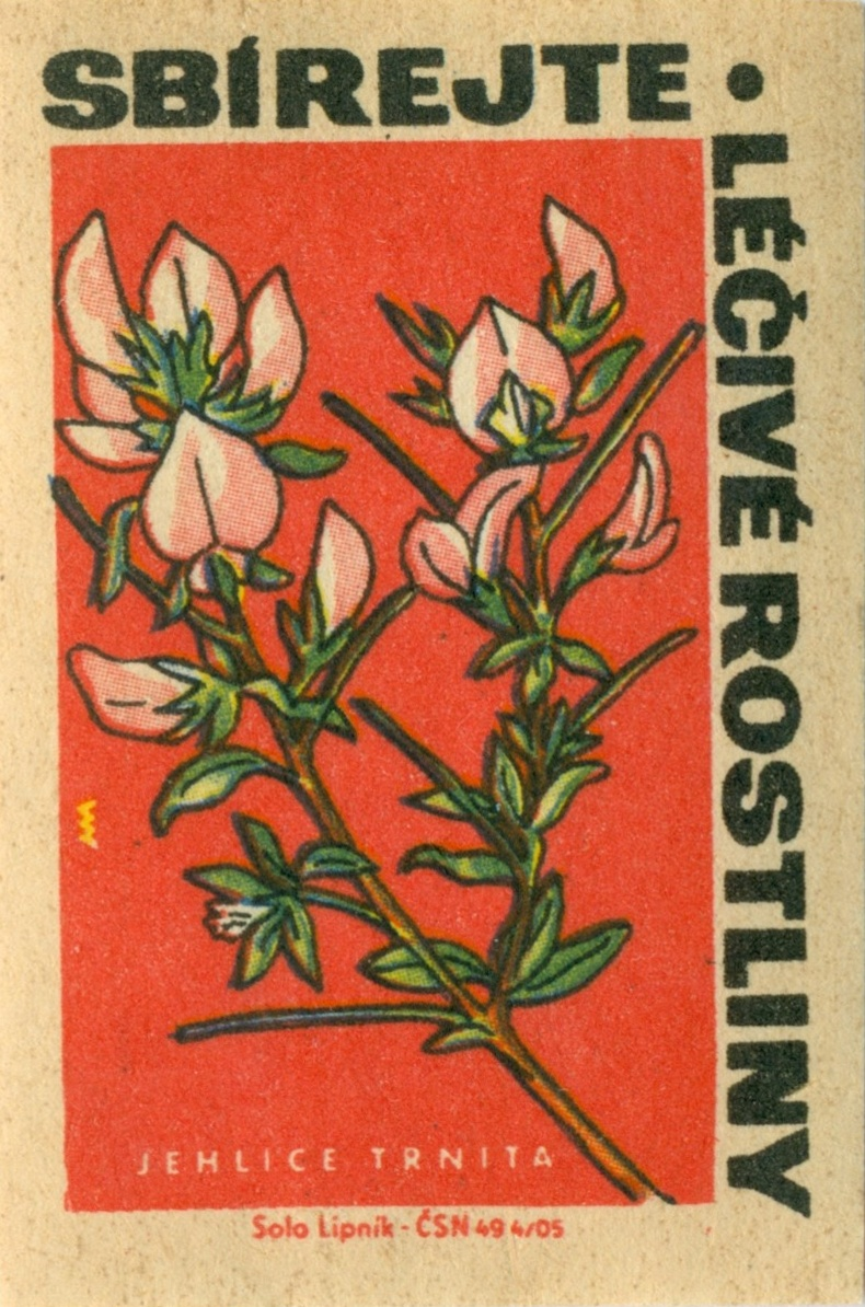 léčivé rostliny